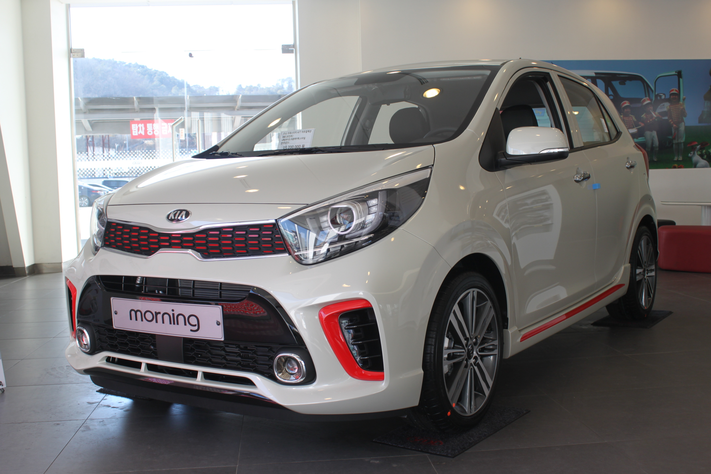 기아 모닝(3세대) 정측면